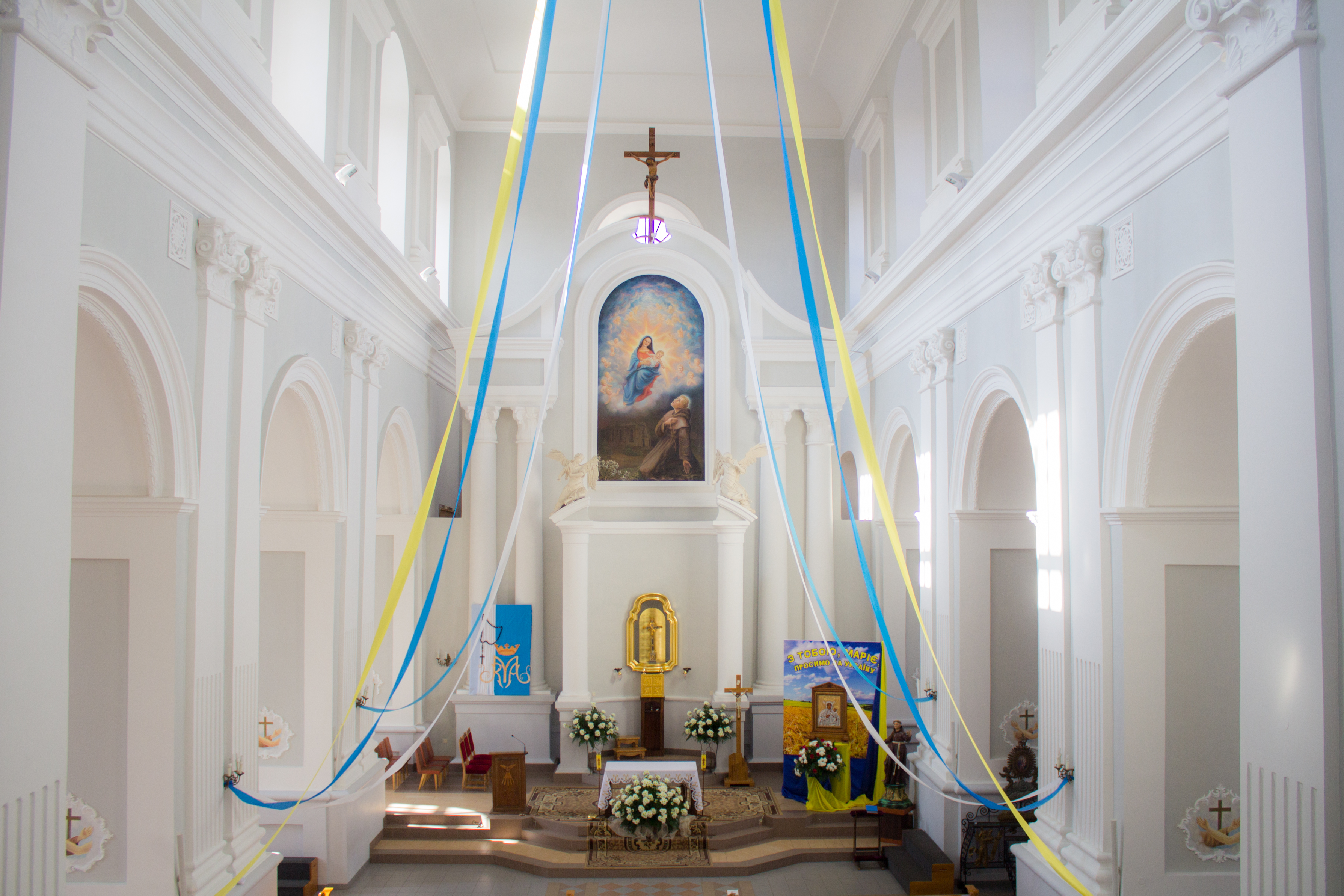 Семінарійський костел Св. Йоана з Дуклі, Житомир, вул. Київська,4